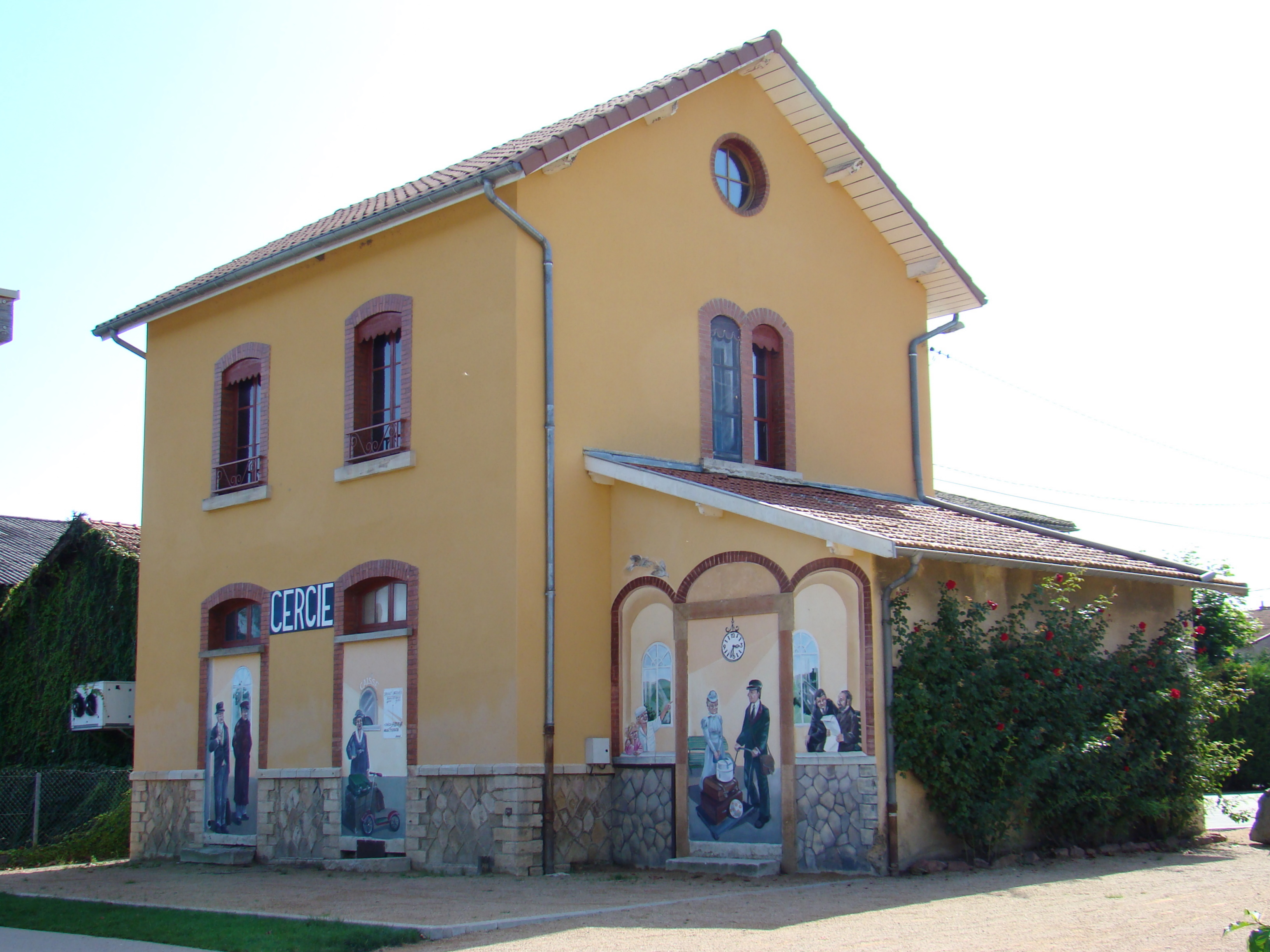 L'ancienne gare de Cercié avec des voyageurs peints en trompe l'oeil